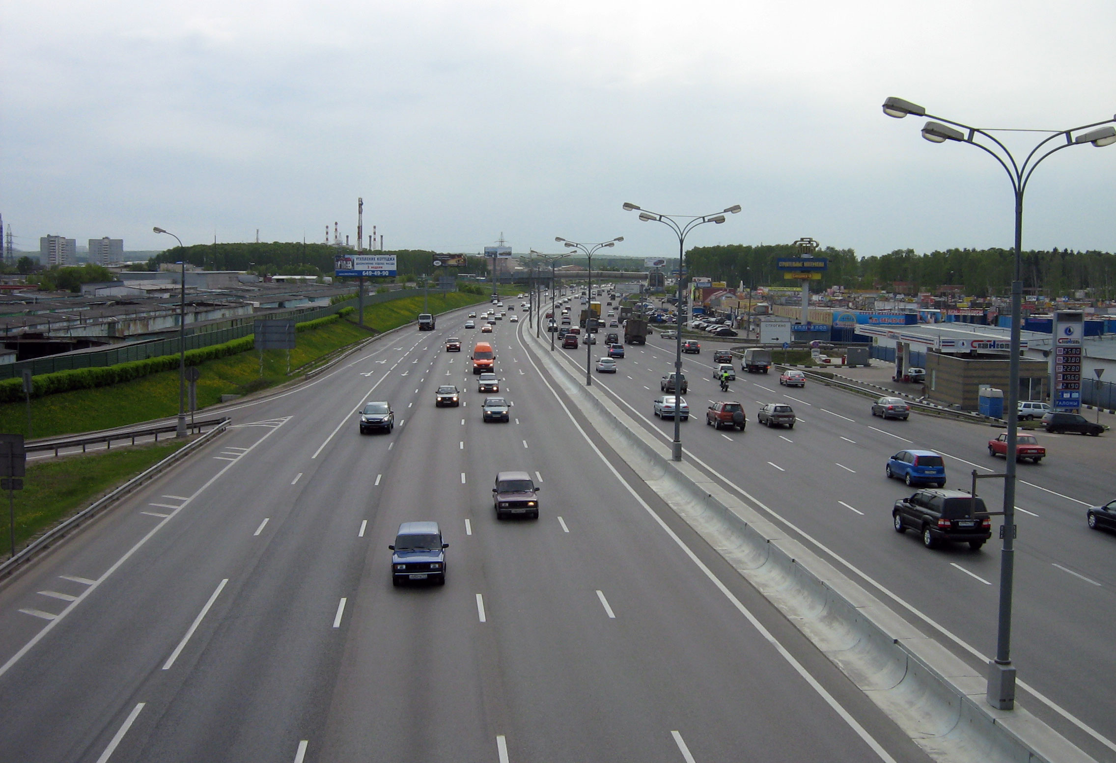 МКАД, 65-й километр, выезд из Строгино, пересечение с Мякининским проездом.